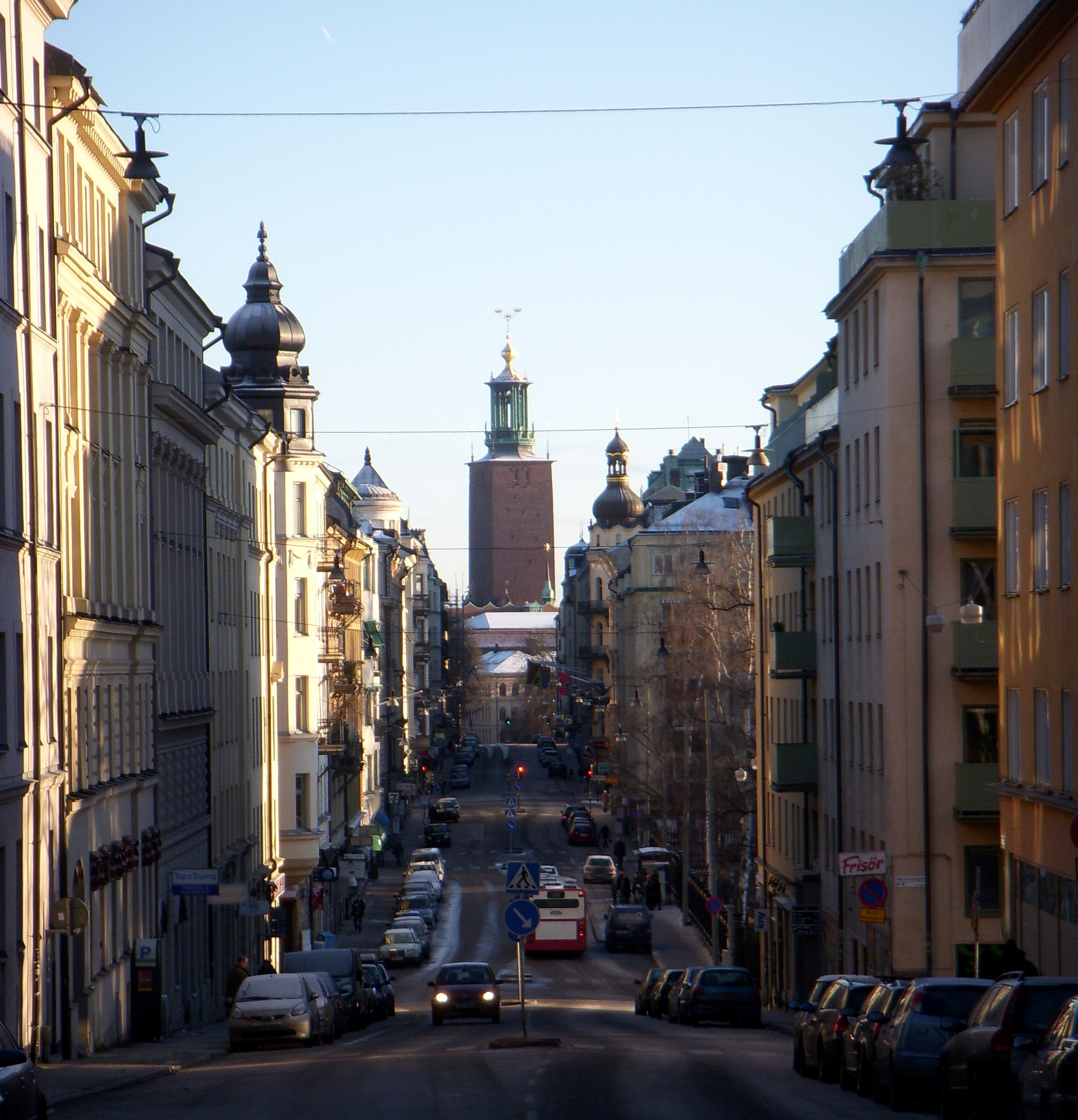 Hantverkargatan i Stockholm, Kungsholmen